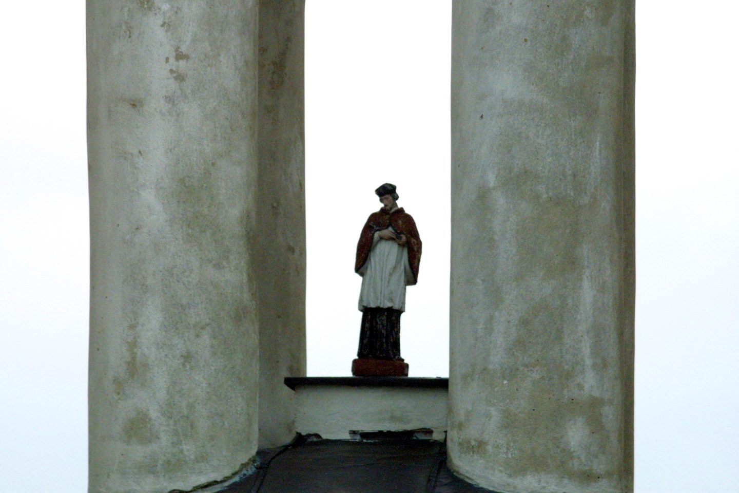 Jabłonna Lacka. Św. Jan Nepomucen w Kapliczce przydrożnej.